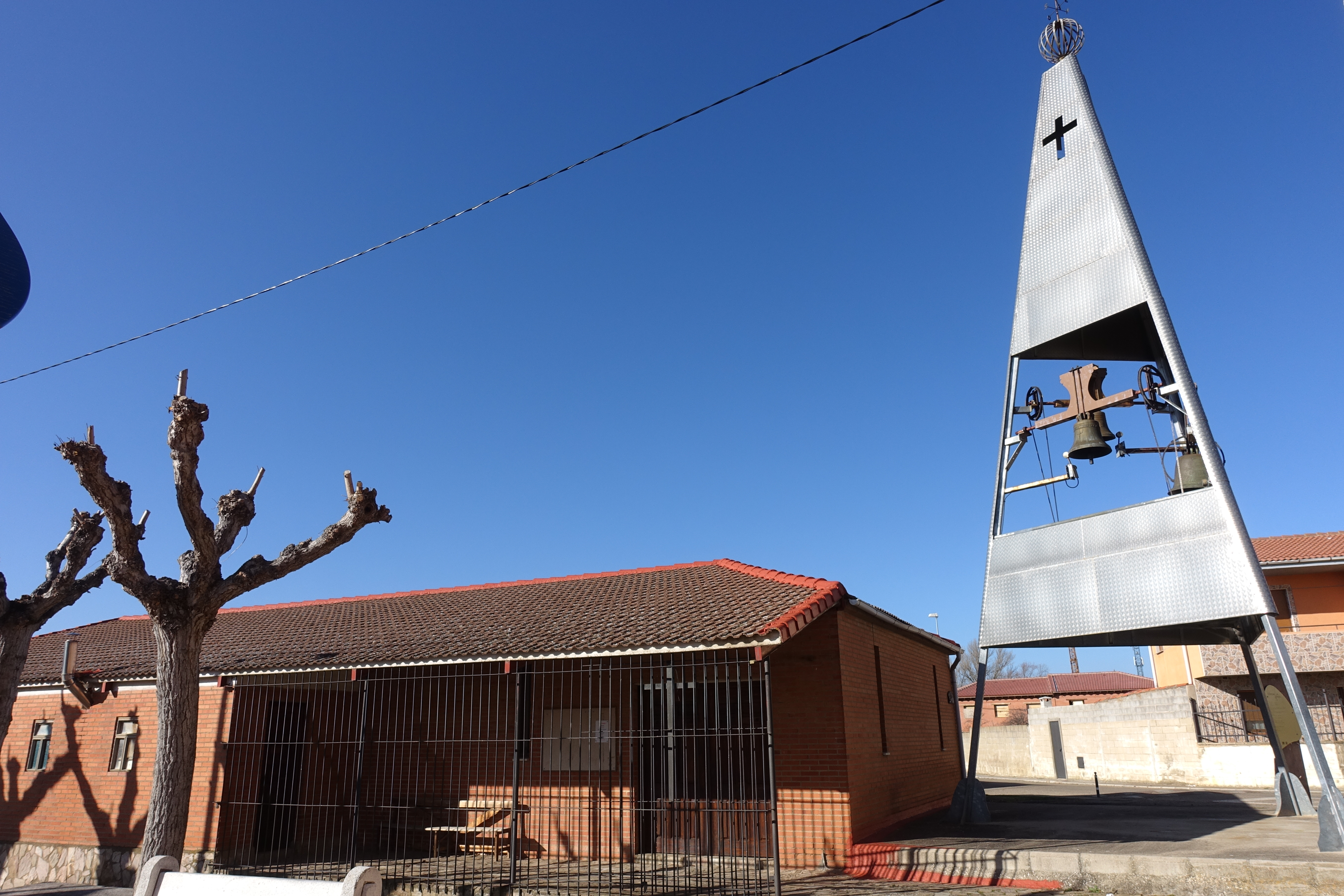 Iglesia de San Martín, Chozas de Abajo (León, España).